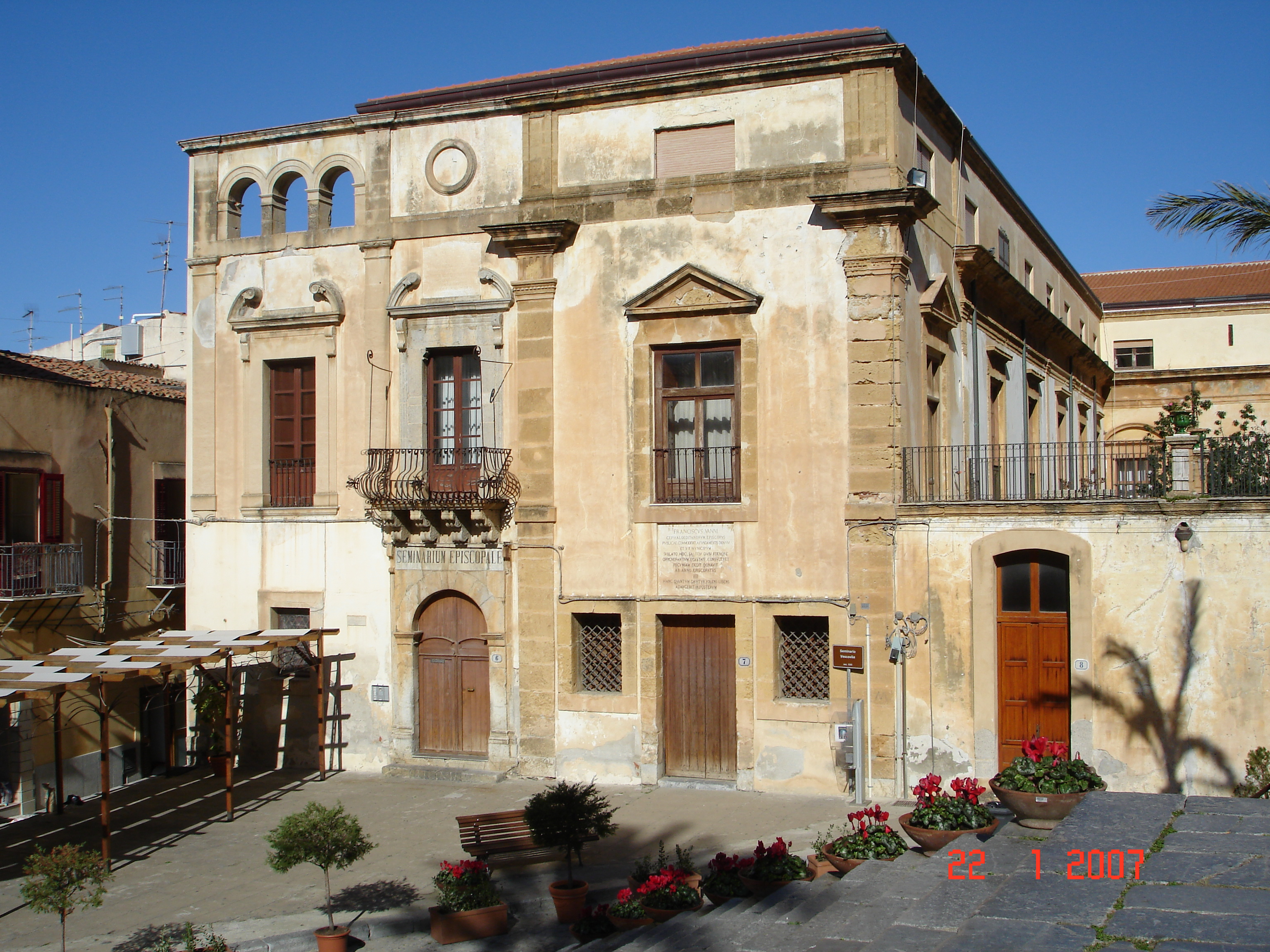 Seminario vescovile a Cefalù Cortesemente offerta da Pascal Guercio